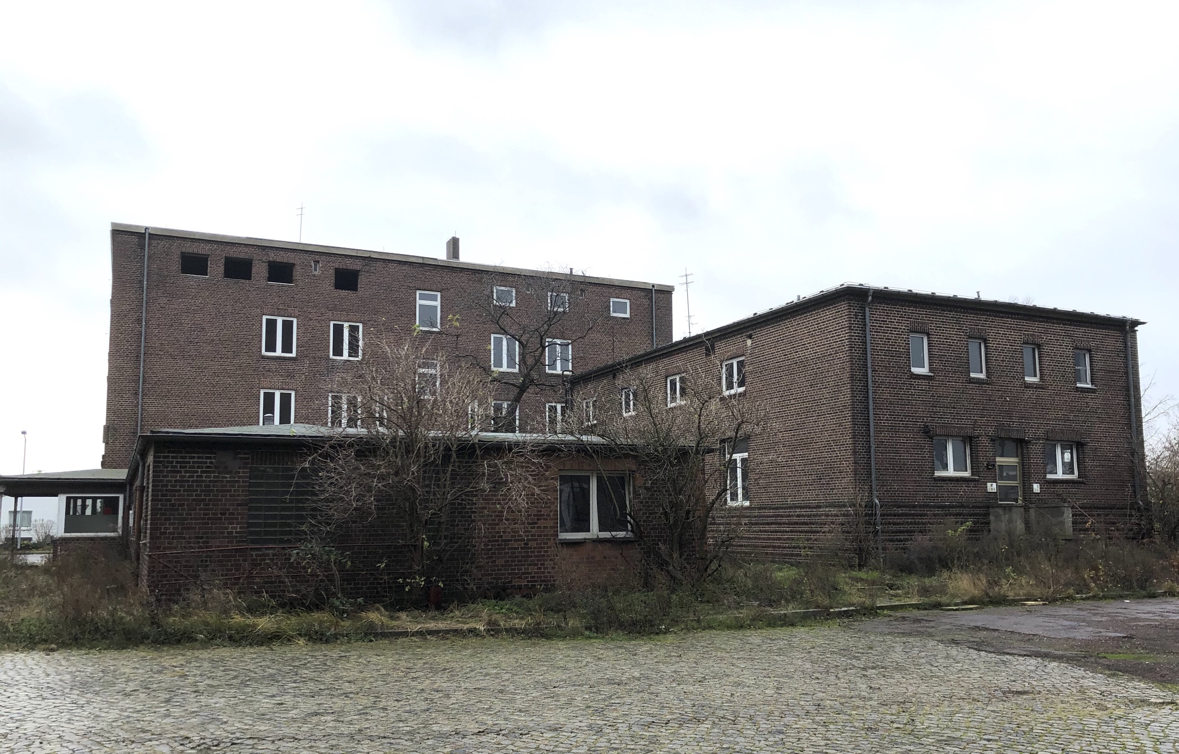 Konsummühle Magdeburg Wohn und Verwaltungsbau Blick von Norden